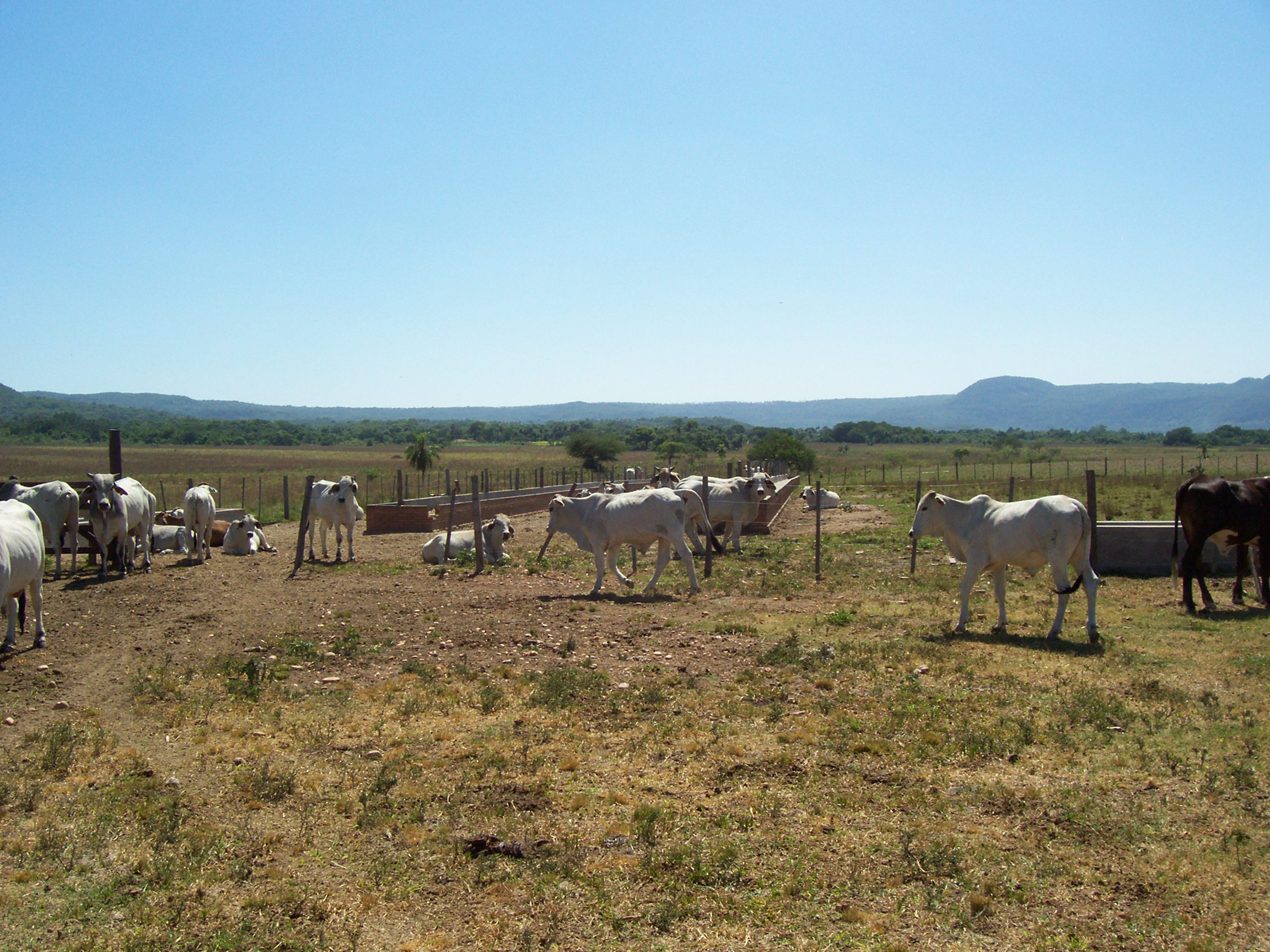 Cría de Ganado vacuno en la Estancia Paraíso de Pirayú (propiedad de HR Campos y Hacienda S.A.) En el fondo se observa la Cordillera de los Altos.